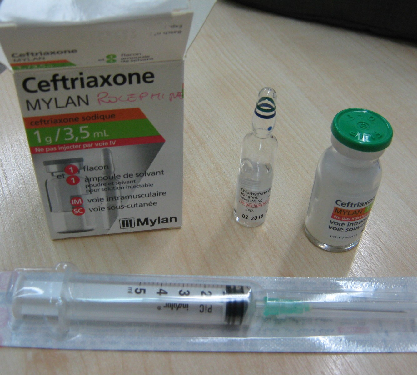 Antibiotique Ceftriaxone (Rocephine) pour intramusculaire